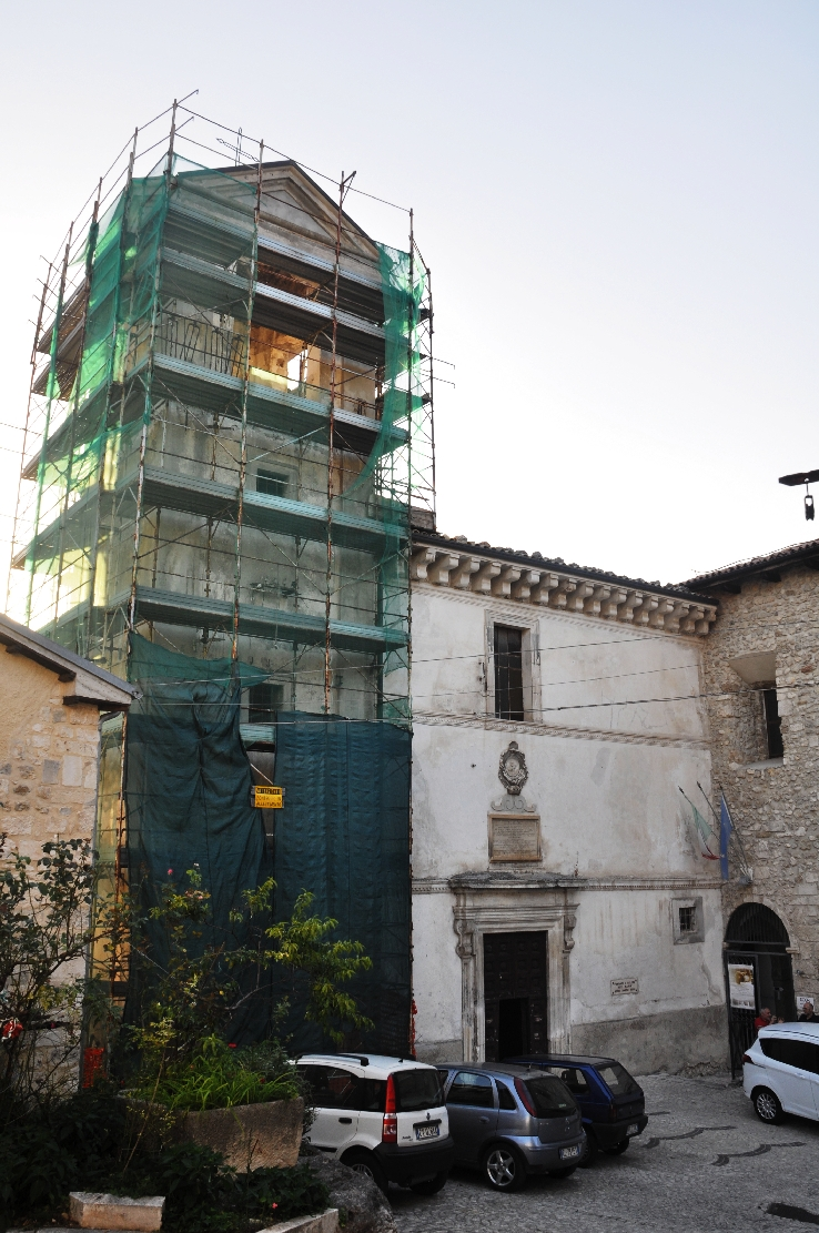 Caramanico Terme 2014